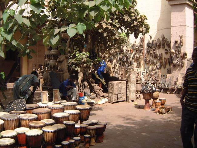 Photo prise dans la zone artisanal au centre de Bamako.